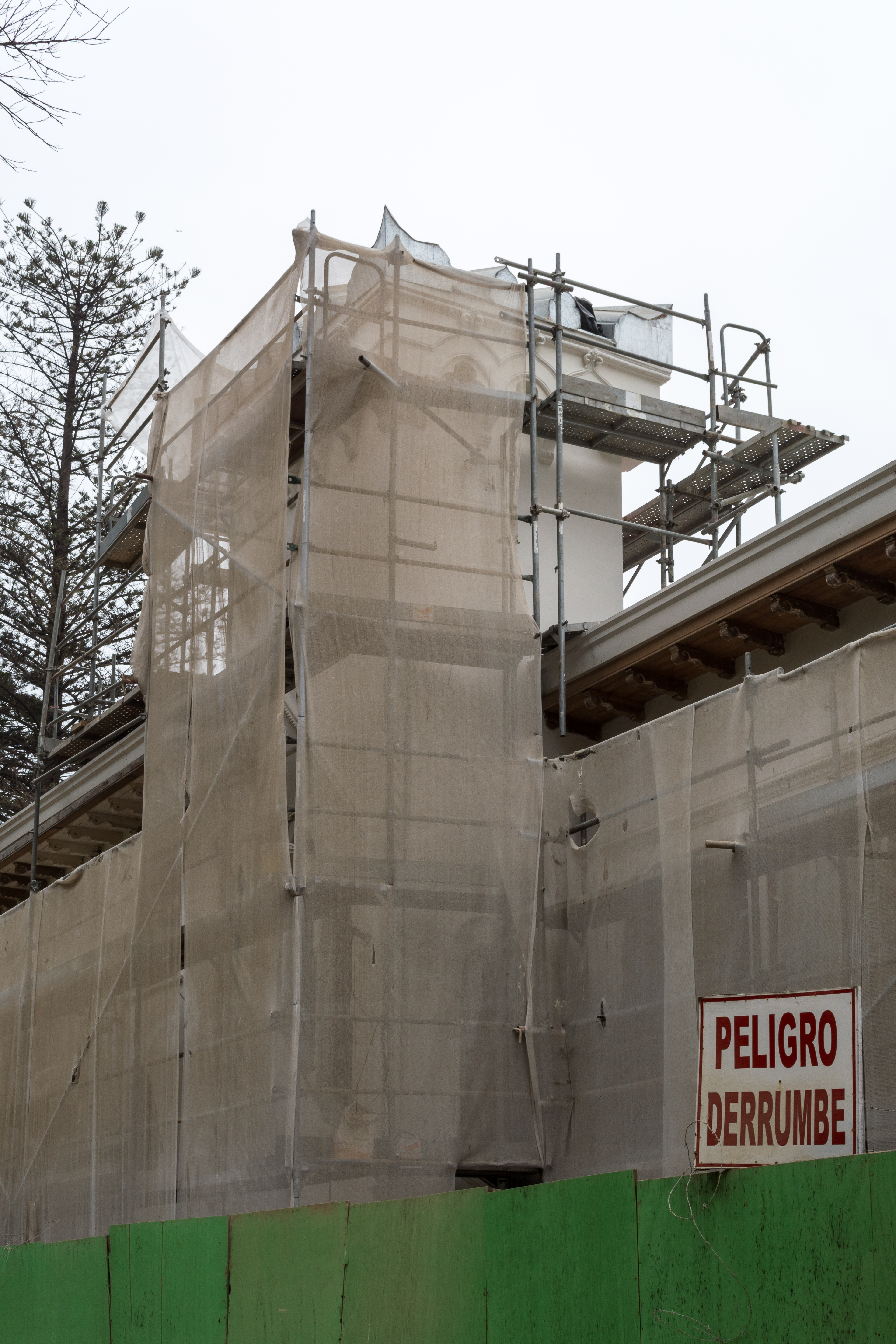 Reconstrucción Palacio Vergara, Quinta Vergara, Viña del Mar, Región de Valparaíso, Chile